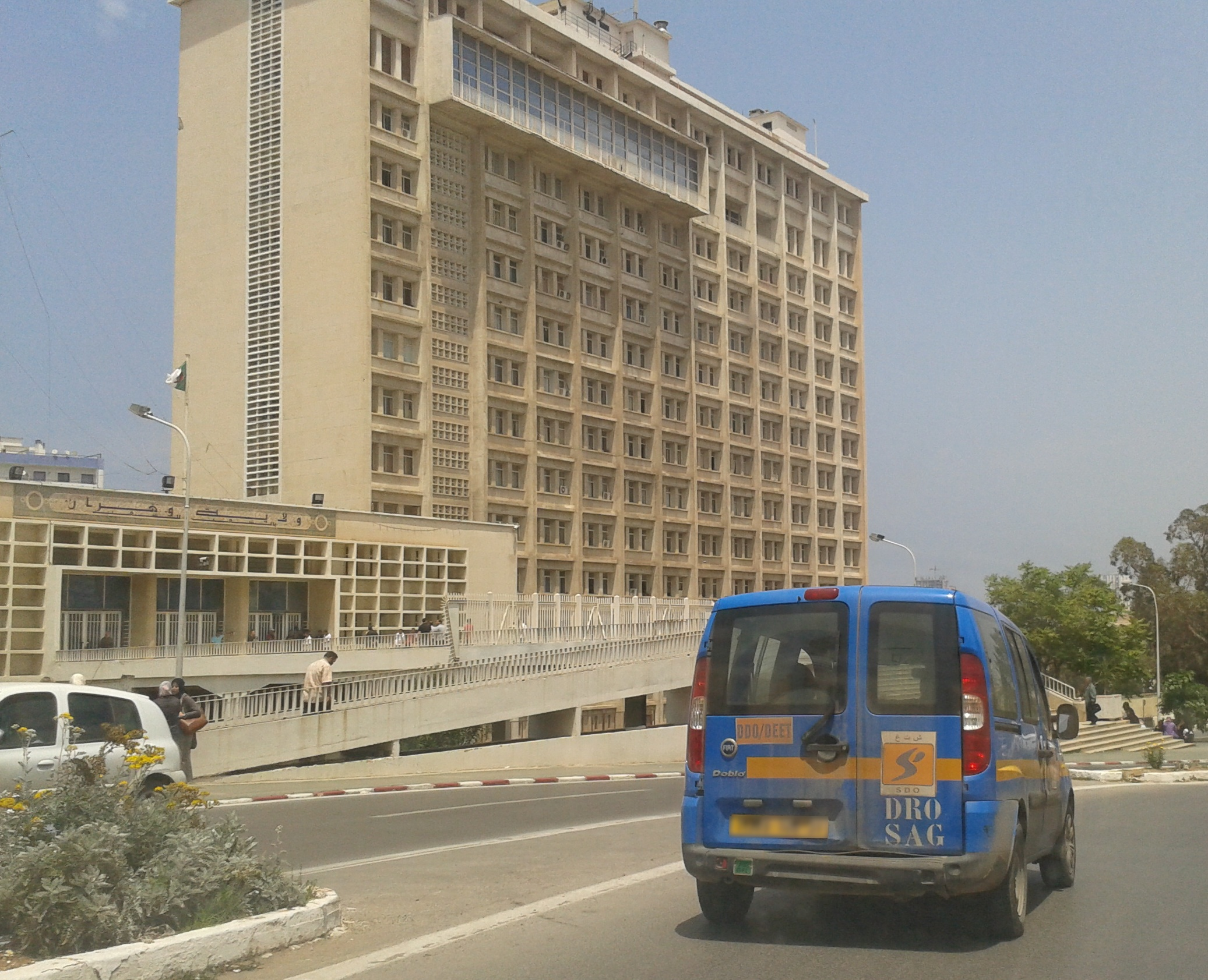 مبنى ولاية وهران